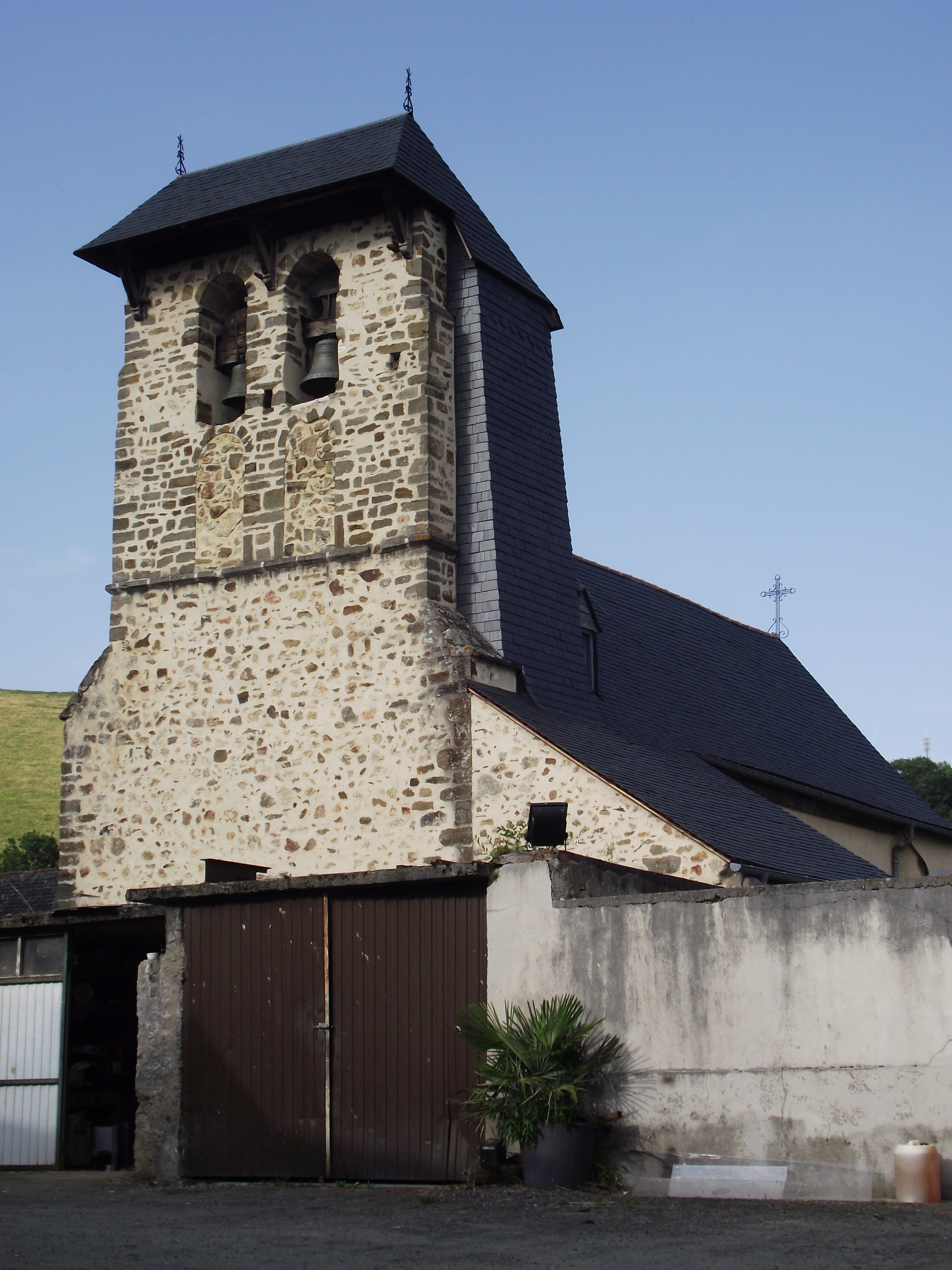 Église Saint-Pierre de Julos, Hautes-Pyrénées, France